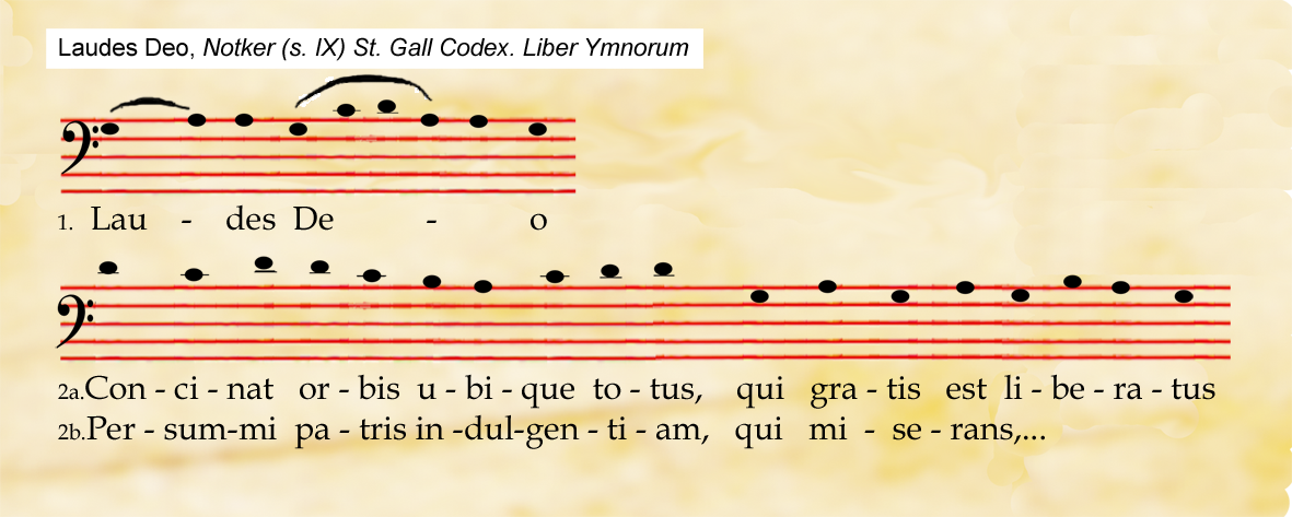 Secuencia: Laudes Deo, Notker Balbulus (s IX), Codex. Liber Ymnorum, St. Gall. Copia moderna.